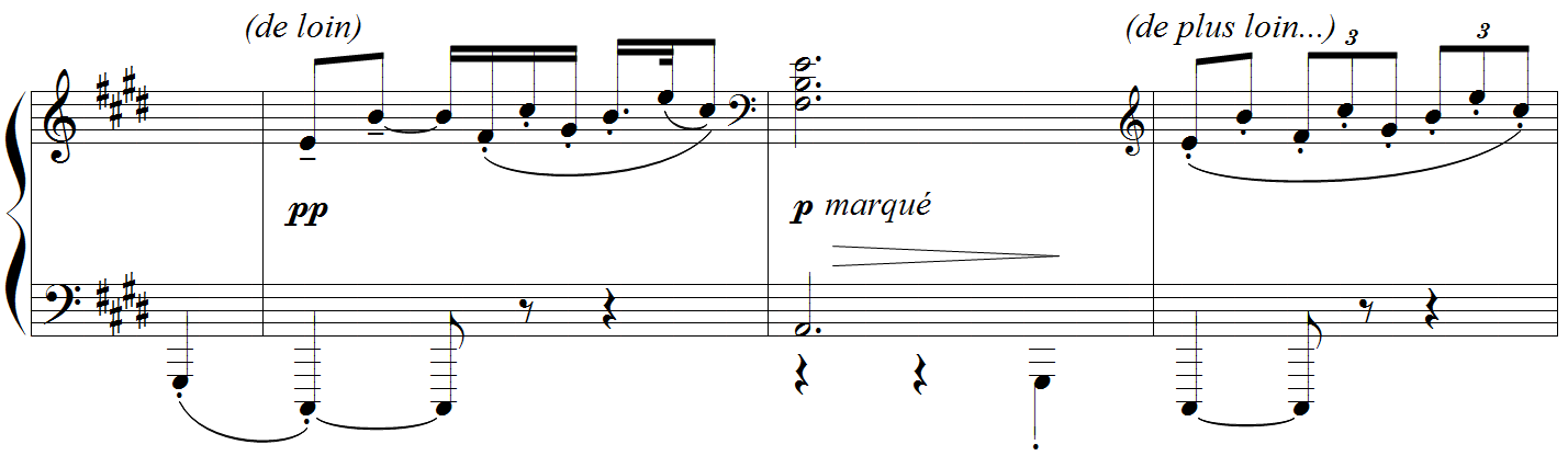 Debussy - Etude "pour les sonorités opposées", mes. 68-70